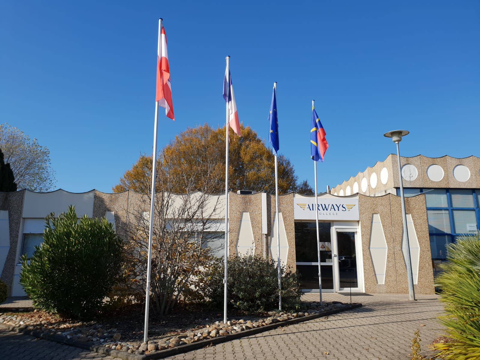 campus d'Airways College à Agen